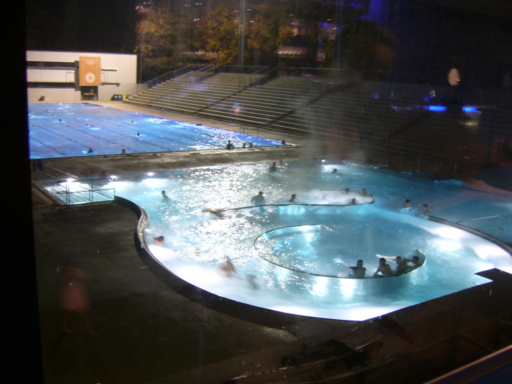 Dantewarmfreibad im Winter